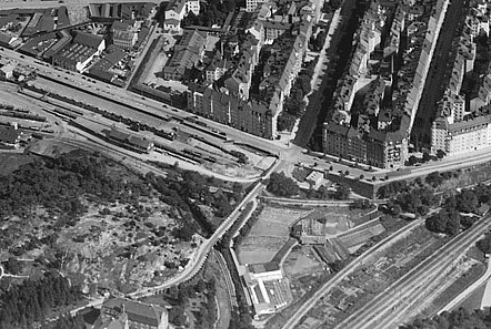 Norra stationsgatan och Tomtebodabron 1938